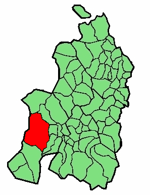 Baigorri udalerriaren kokapena nafarroa behereran